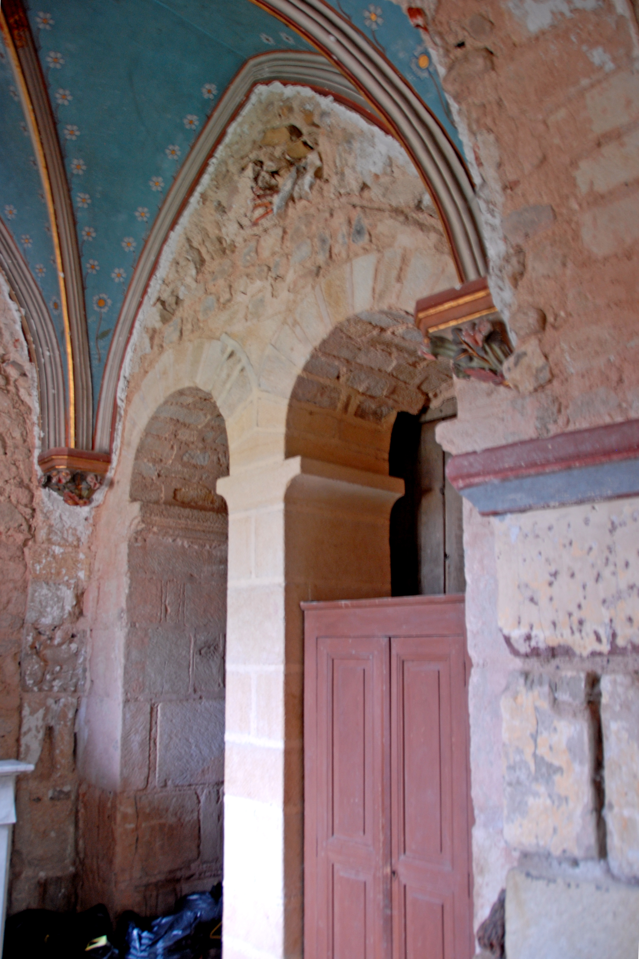 Prioratskirche, nordwestl. Chorseitenschiff, Chorwand